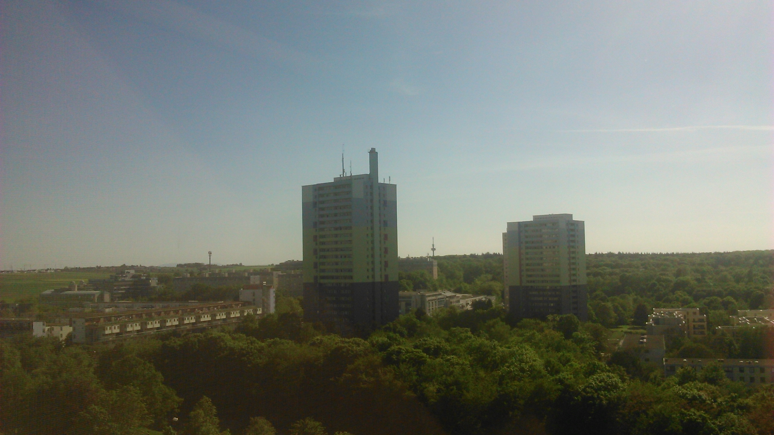 Blick auf den Mainzer Lerchenberg vom ZDF-Hochhaus, im Hintergrund der Ober-Olmer Wald und der Fernmeldeturm Ober-Olm.